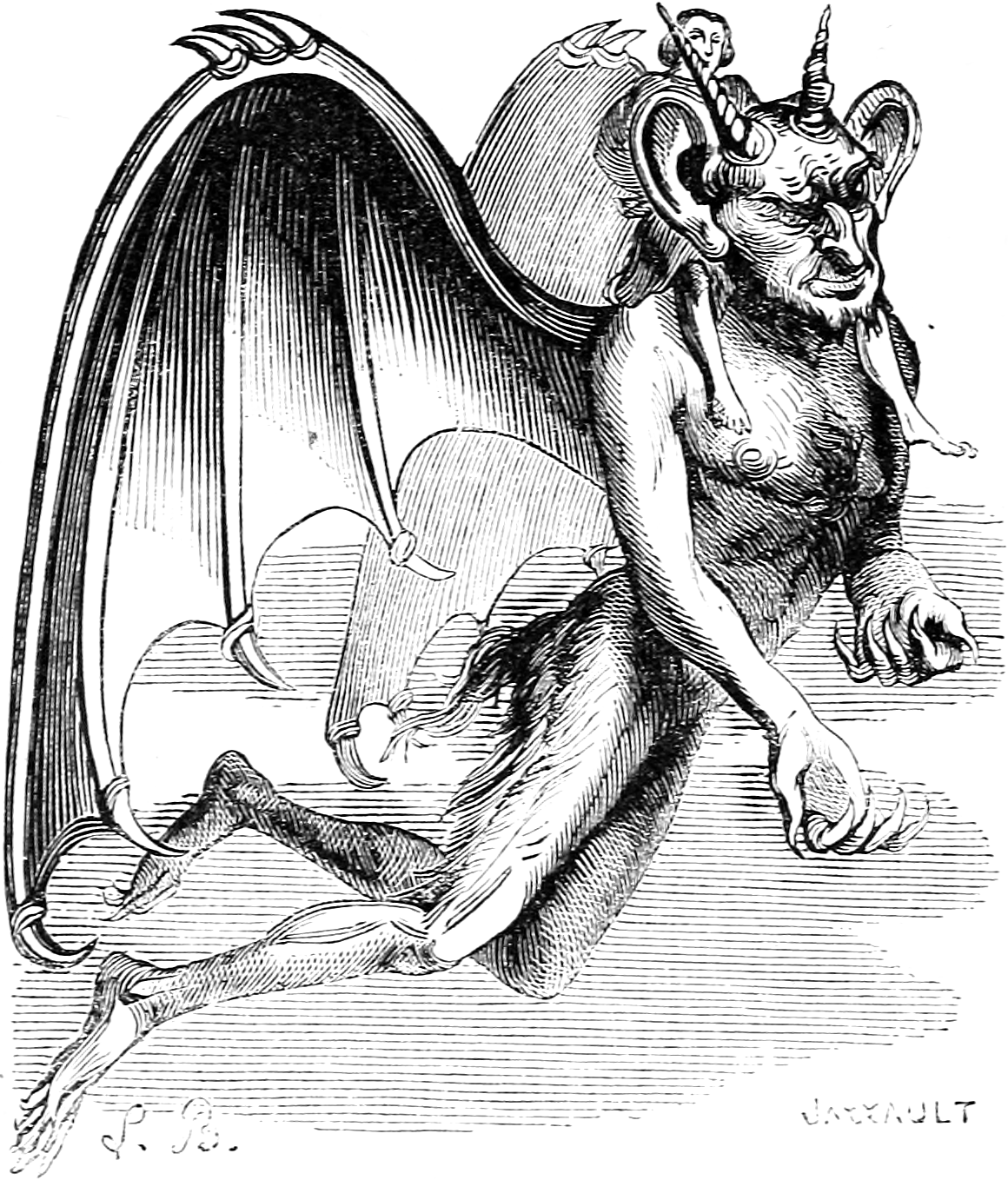 Une illustration pour l’article Tables tournantes dans le Dictionnaire infernal par Collin de Plancy.